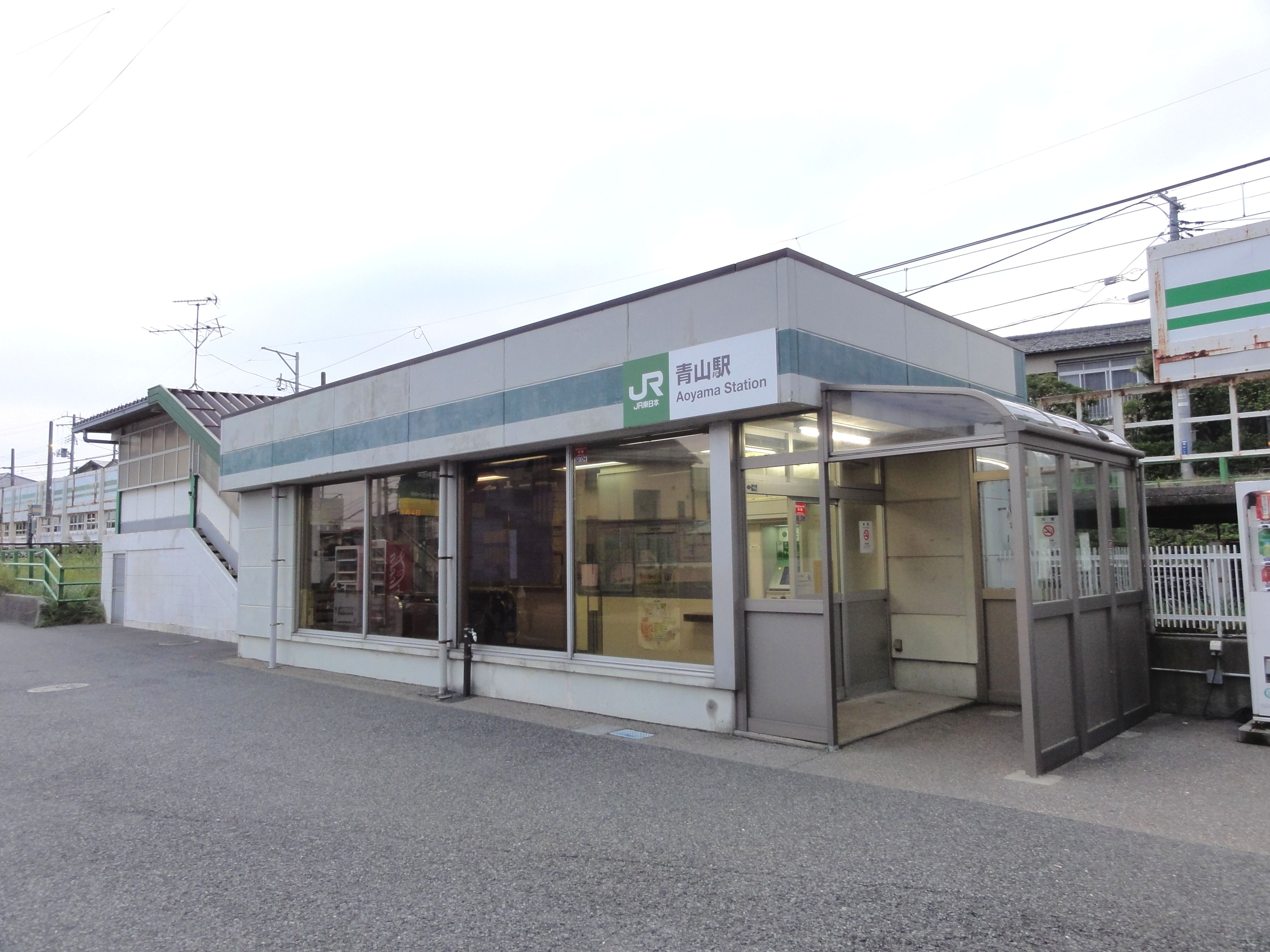 青山駅